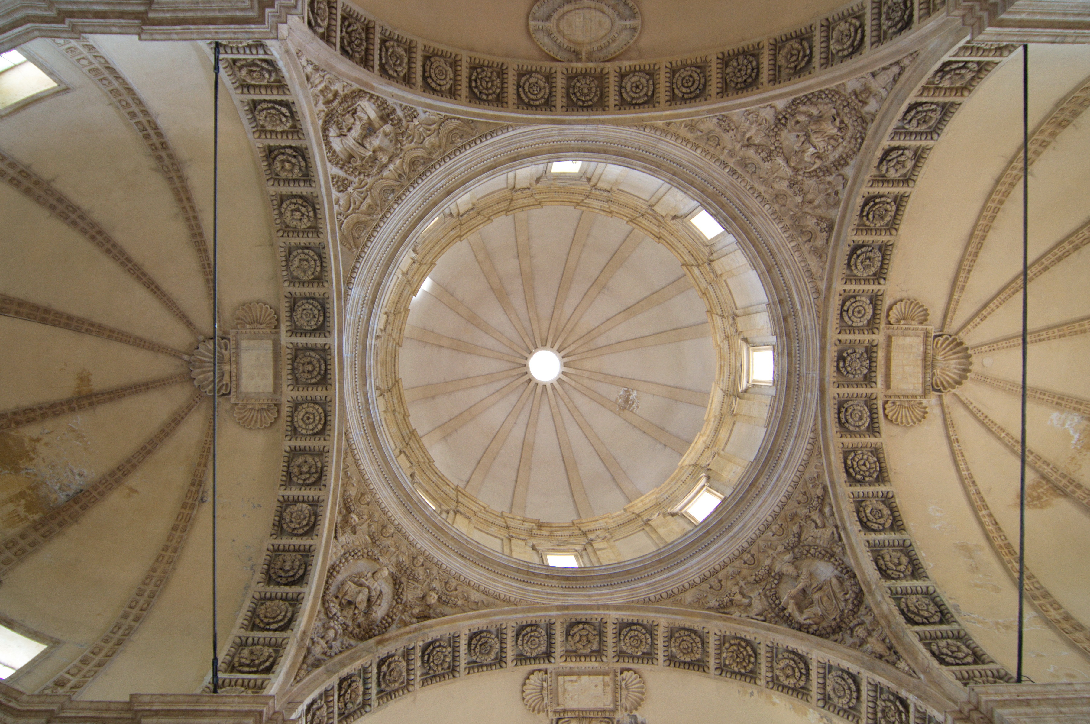 Cupola del Tempio di Santa Maria della Consolazione, Todi This is a photo of a monument which is part of cultural heritage of Italy.